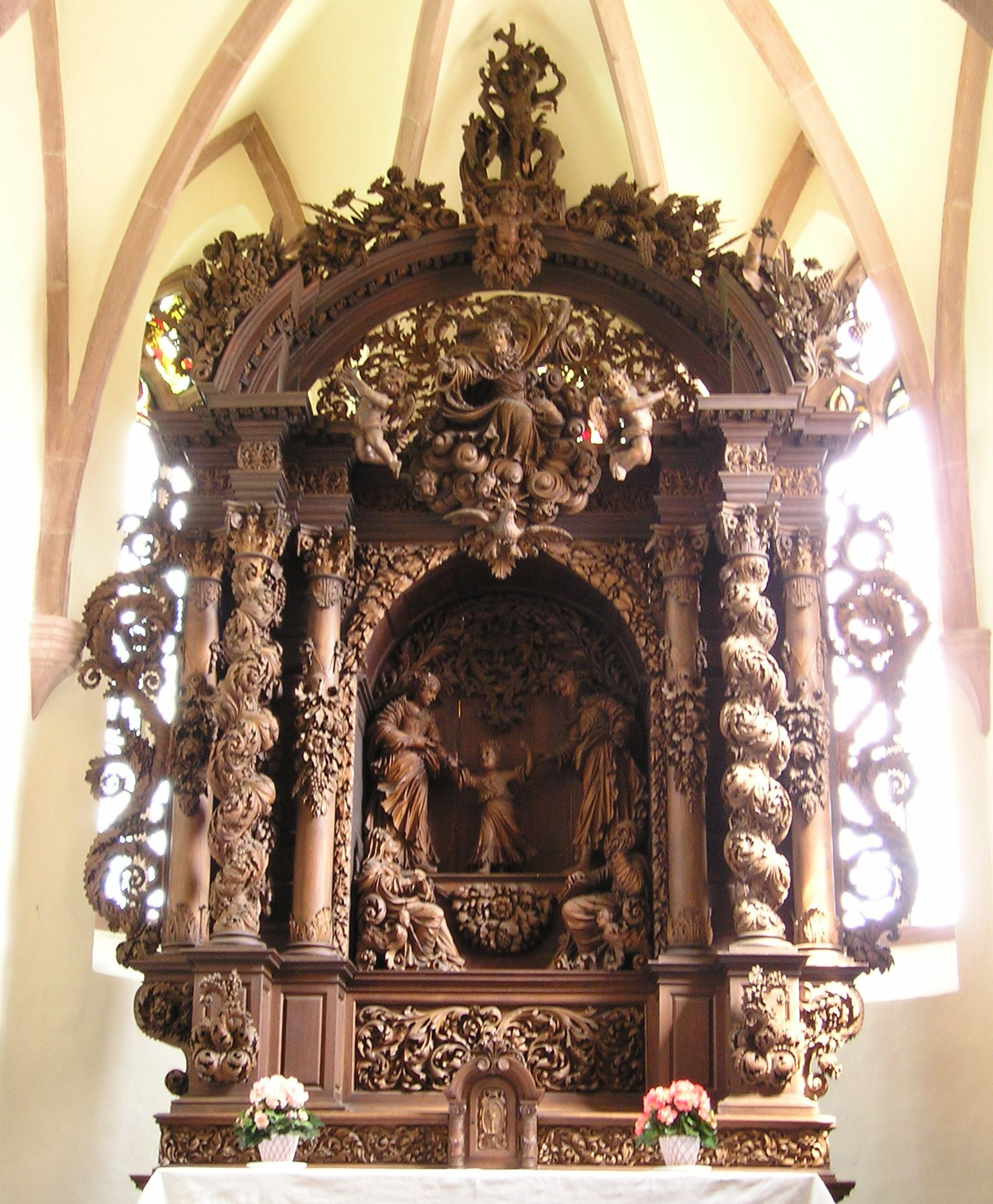 Autel de la Chapelle Saint-Sébastien de Dambach-la-Ville (Alsace)